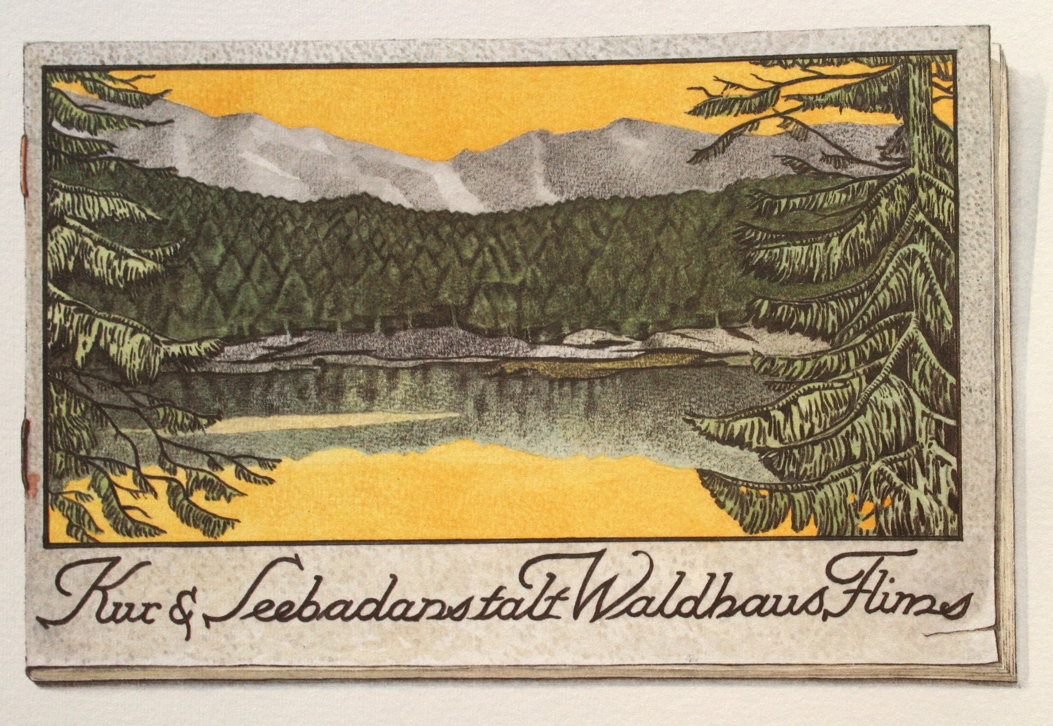 Prospekt Kur & Seebaldanstalt Waldhaus Flims; um 1880